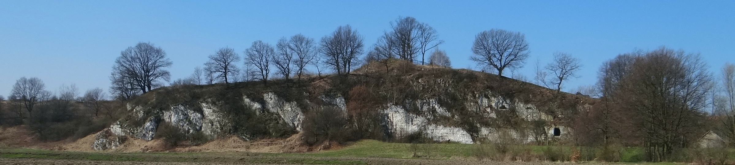 Kamieniołom w Piekarach